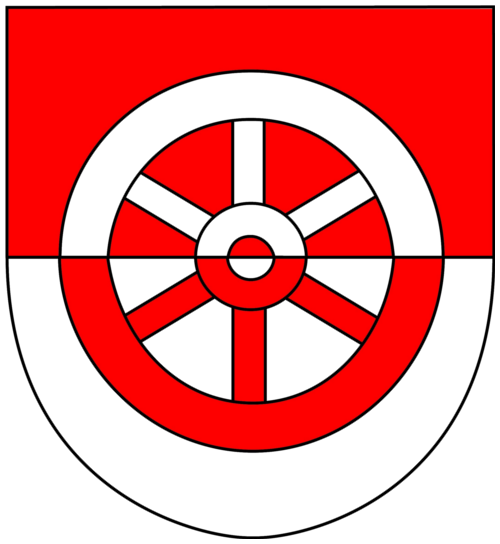 Wappen der Ortsgemeinde Weiler bei Bingen.